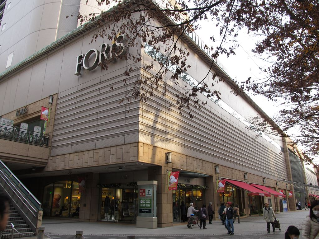 東京都府中市 Fuchu-city, Tokyo